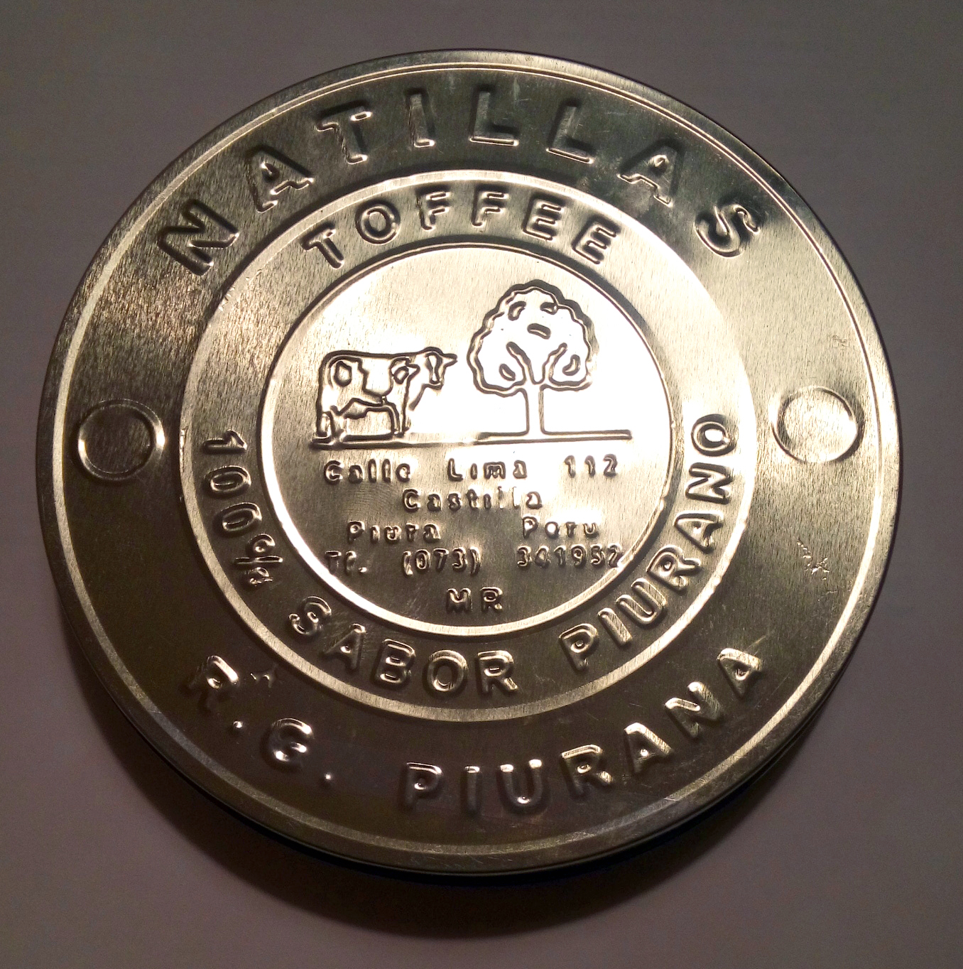 Postre típico de los departamentos de la costa norte del Perú, como Tumbes o Piura. A diferencia de la natilla española, la peruana está hecha a base de miel de chancaca y leche.